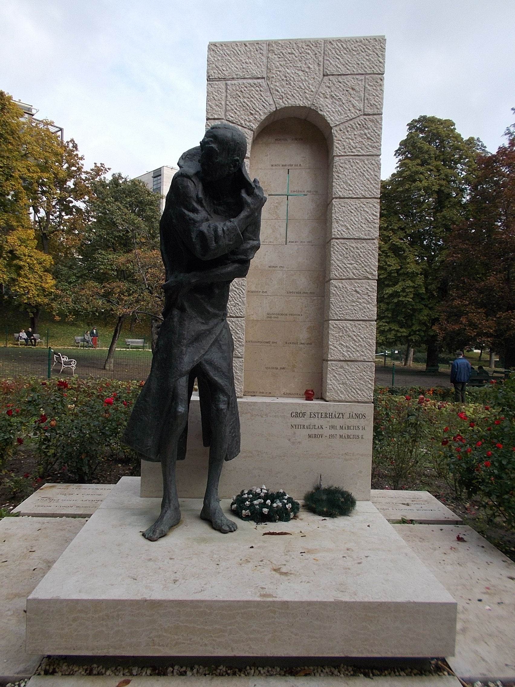 Gróf Esterházy János szobra. a Gesztenyés kertben. Nagy János alkotása. Hidasnémeti Máté (tervező). 2013. Modern, bronz, mészkő, évfordulós szobor. - Magyarország, Budapest, XII. kerület.